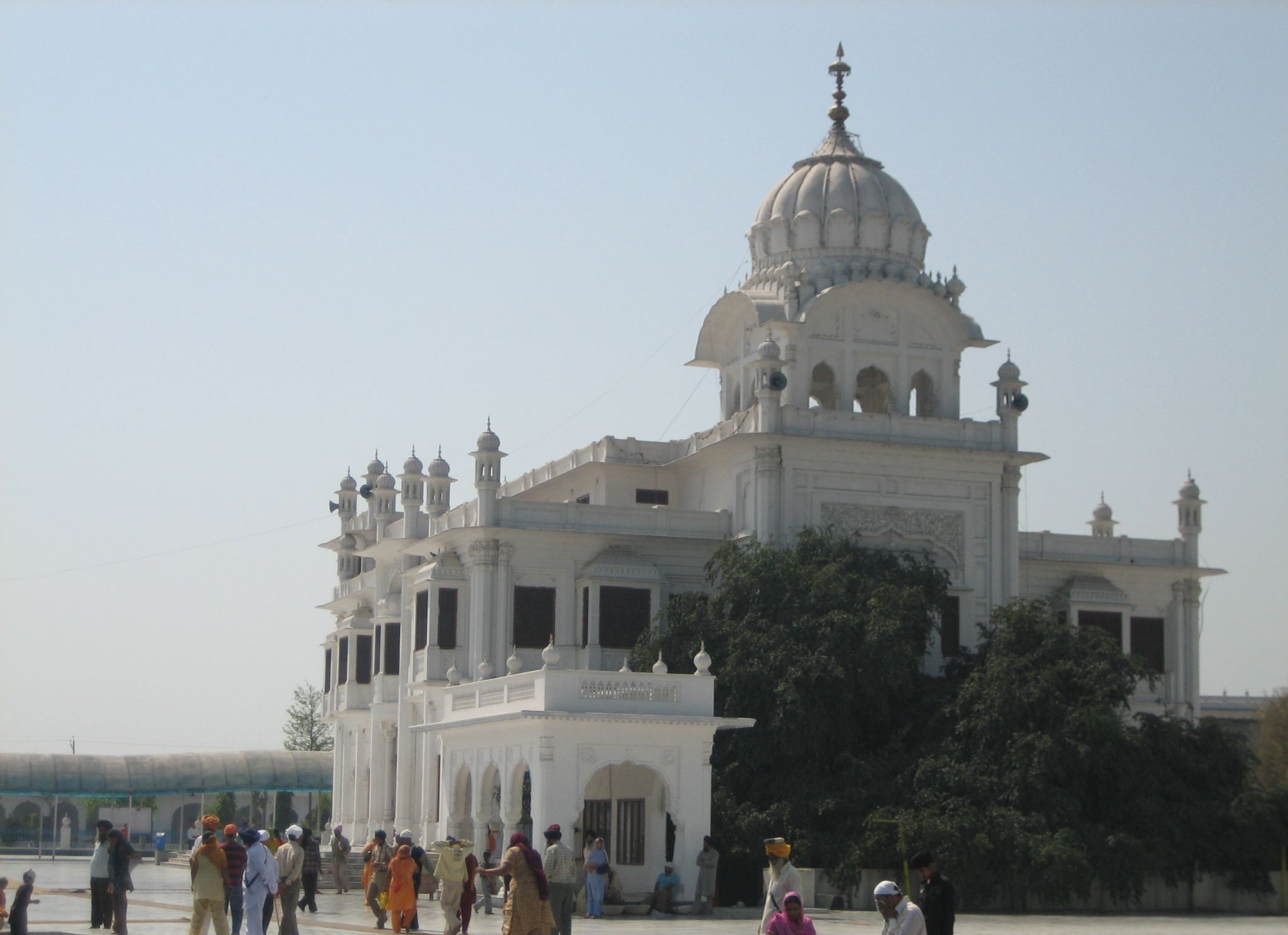 Gurudwara Shree Ber Sahib